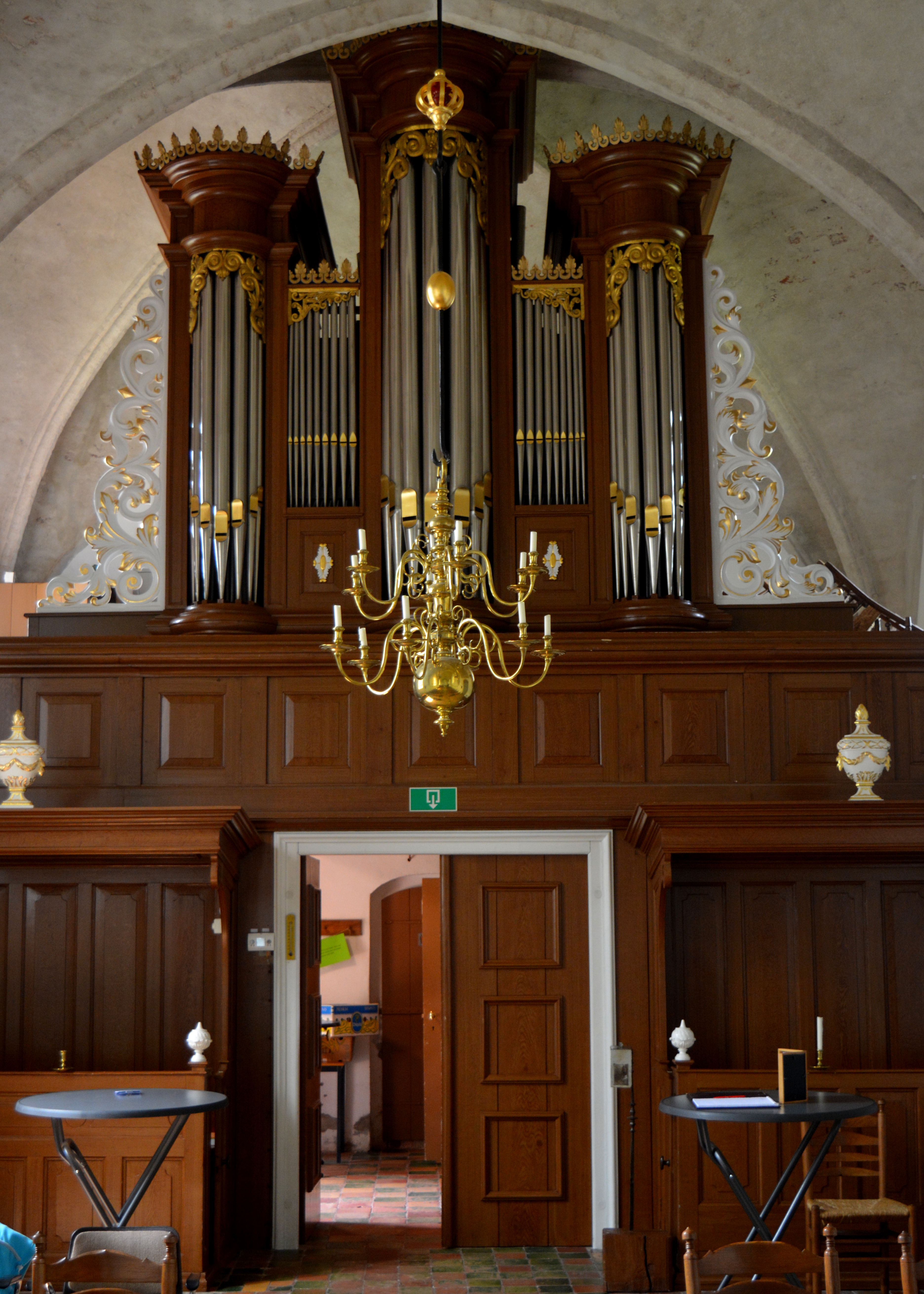 Augustinusga, Augustinuskerk, orgel